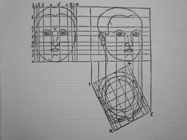 Barbaro Perspektivo (1569), homa vizaĝo perspektivigita